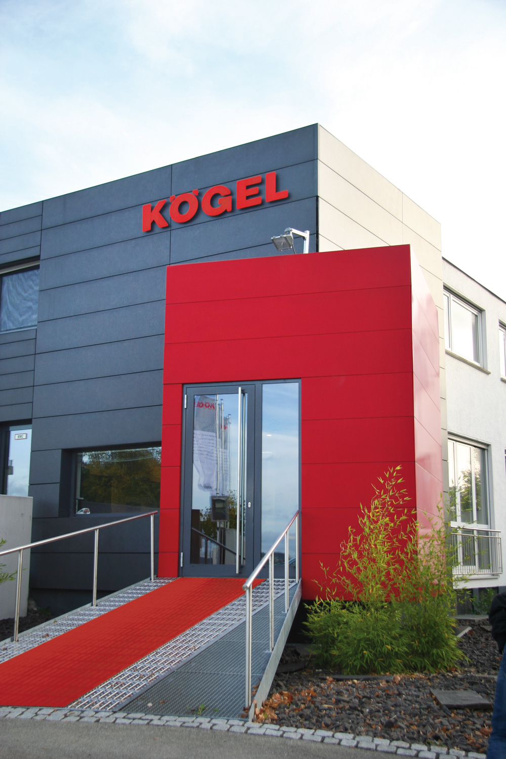 Kögel Pforte